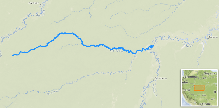 carte réalisée sur umap [1] This map may be incomplete, and may contain errors. Don't rely solely on it for navigation.